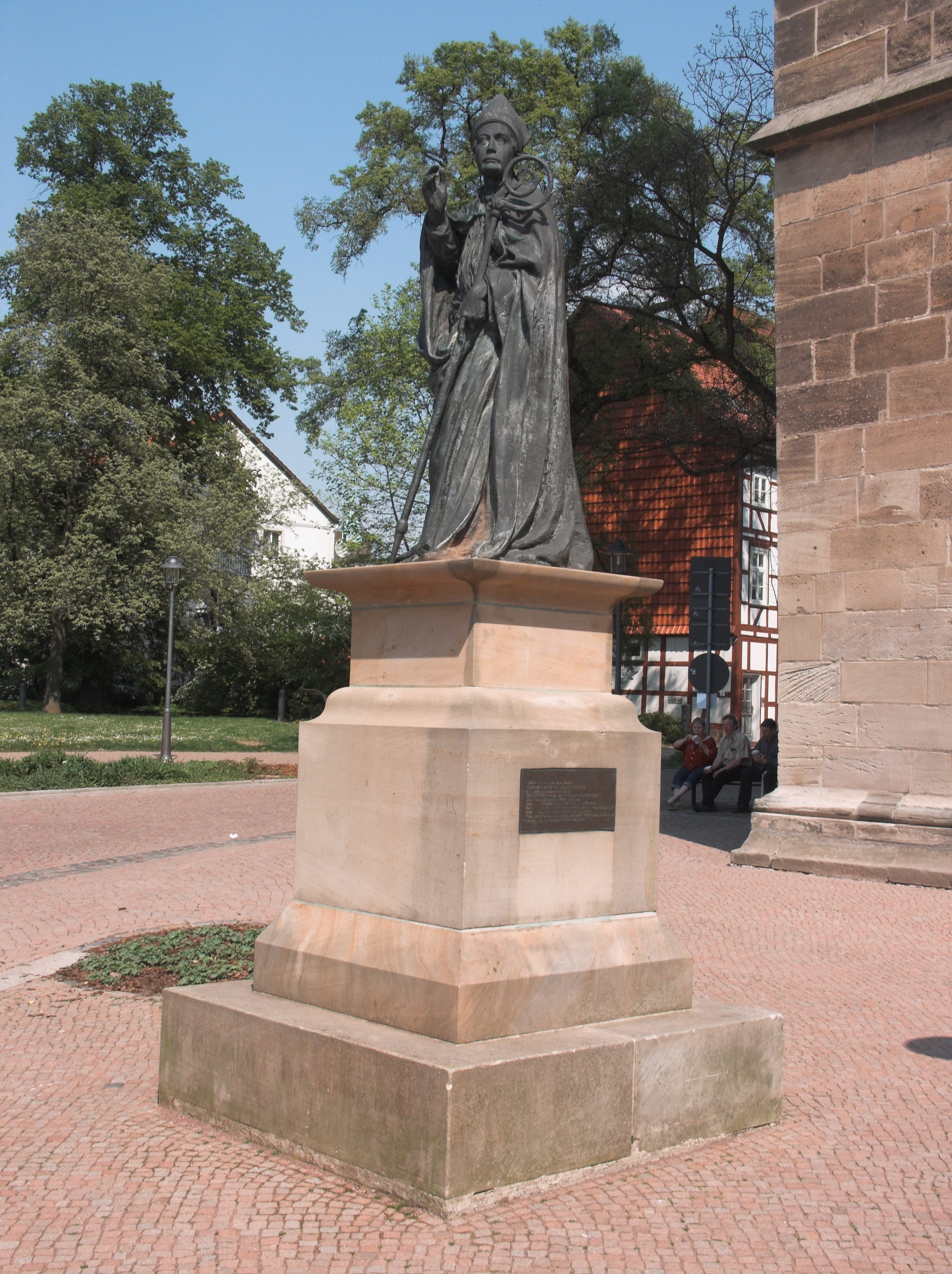 Denkmal für Georg Kardinal von Kopp vor der St. Cyriakuskirche in Duderstadt